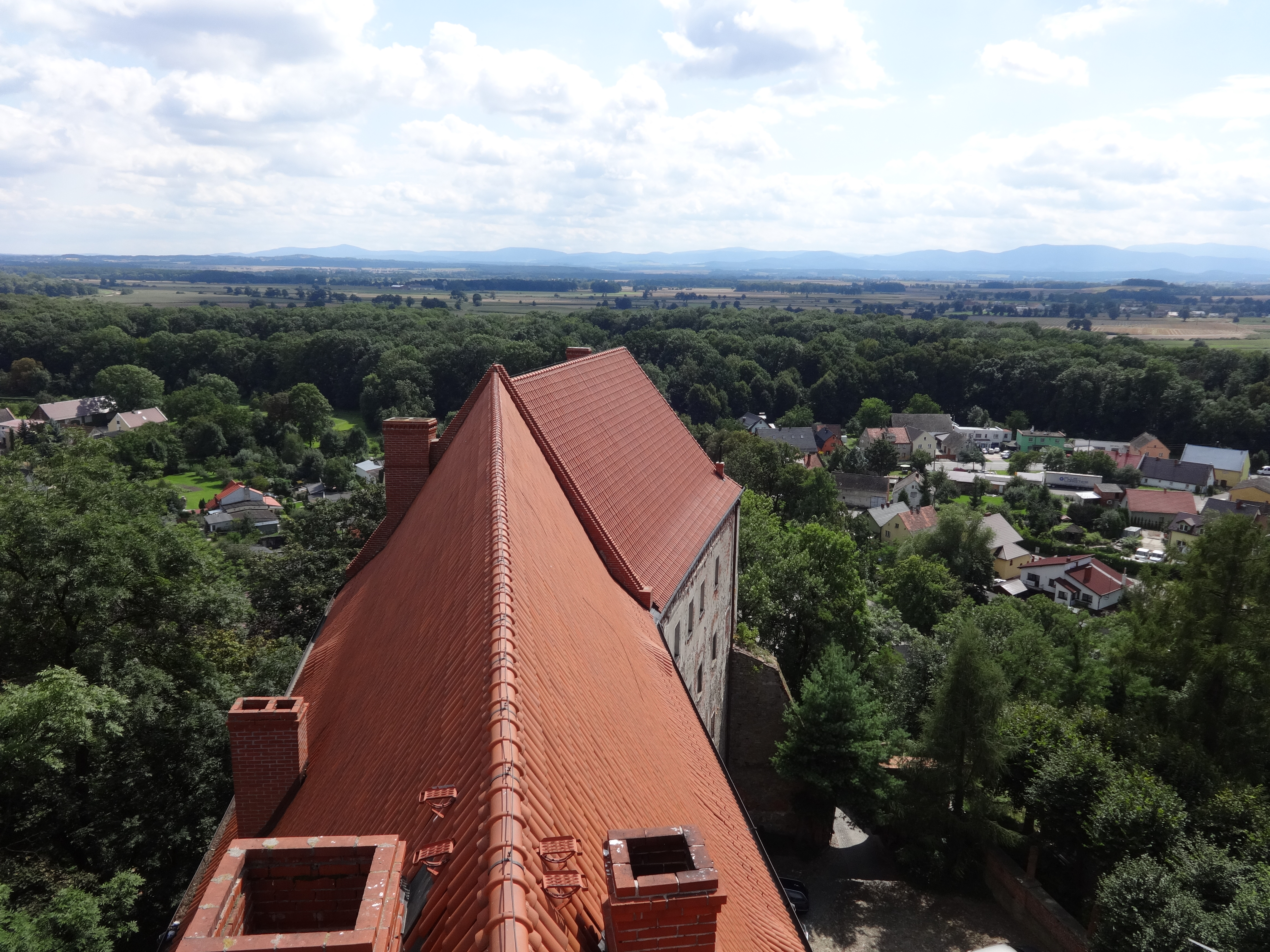 Otmuchów, zamek, ob. hotel, 1295, 1484-85, kon. XVI, 1828